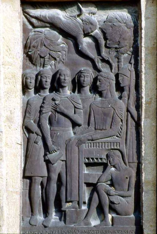 Poeti alla corte di Federico II